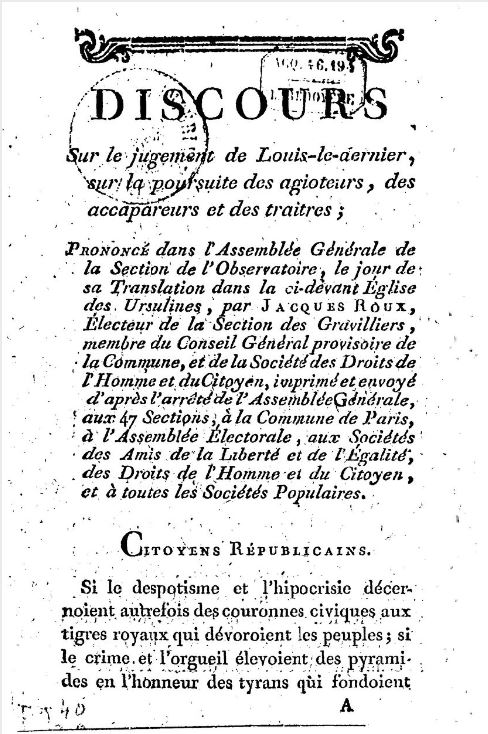 Discours formalisant le programme des revendications sociales et politiques des Enragés